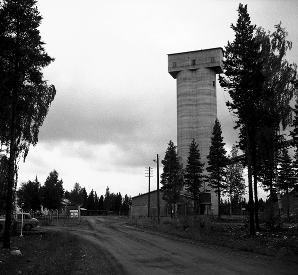 Renströmsgruvans laven 1958.